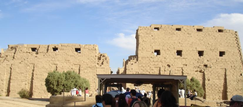 Templo de Karnak.